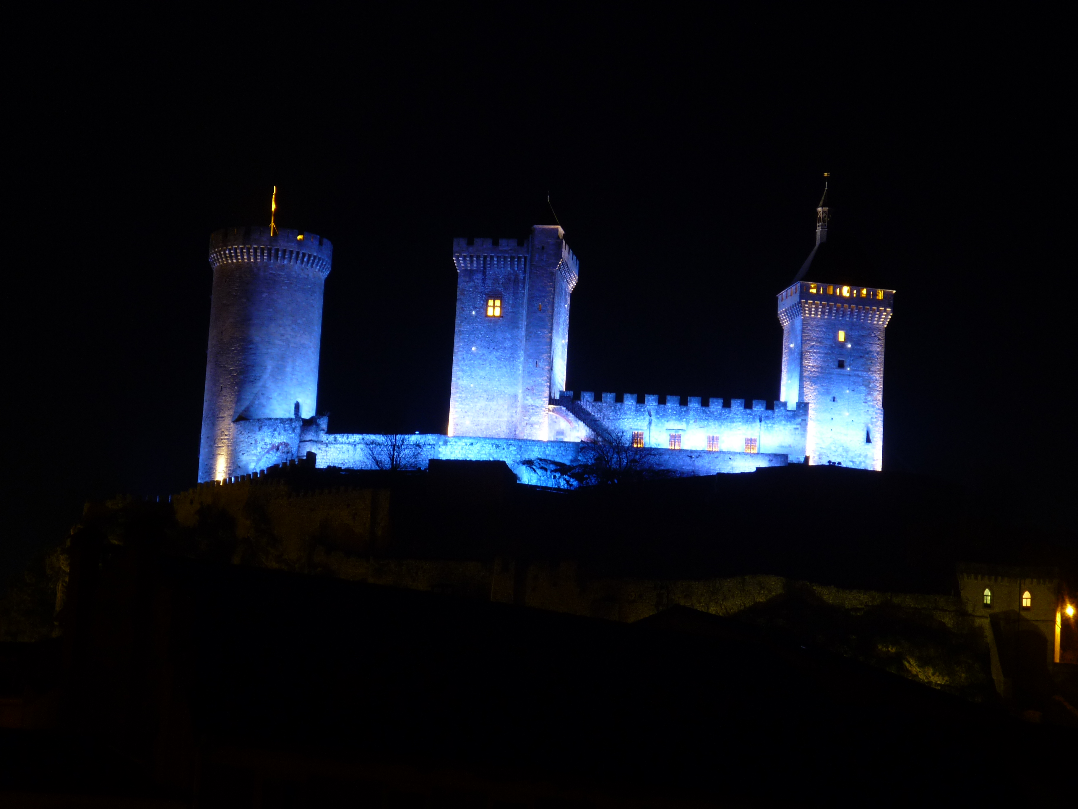 Le château de Foix et ses illuminations nocturnes lors des fêtes de fin d'année, photo prise la nuit de la Saint-Sylvestre, vue depuis le Cours Irénée Cros (RD 919) près du pont vieux.